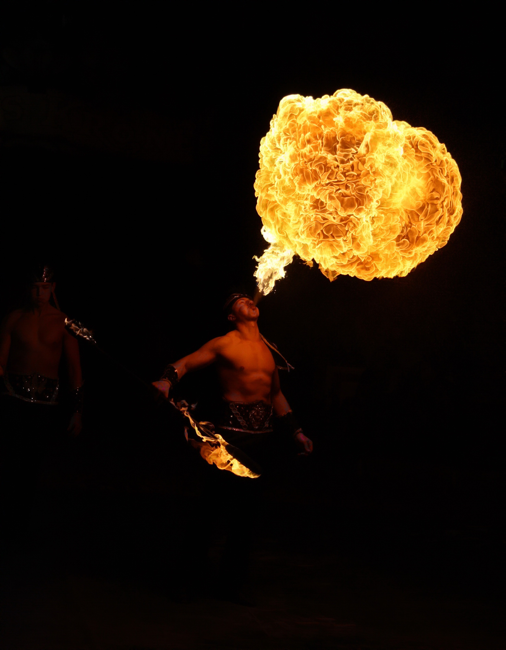 Feuerspucker aus Deutschland. Patrick und Henry Brumbach - Duo Somalas.